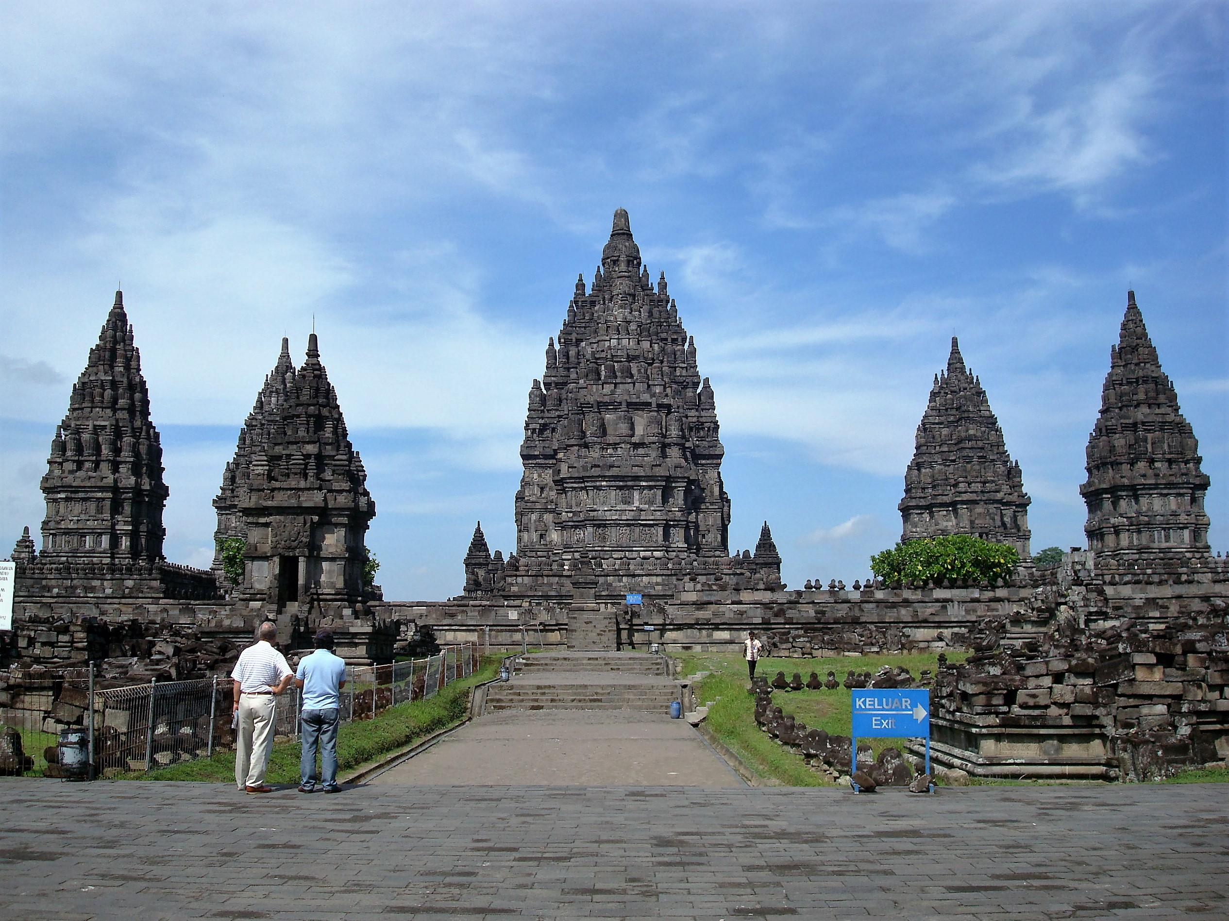 Prambanan